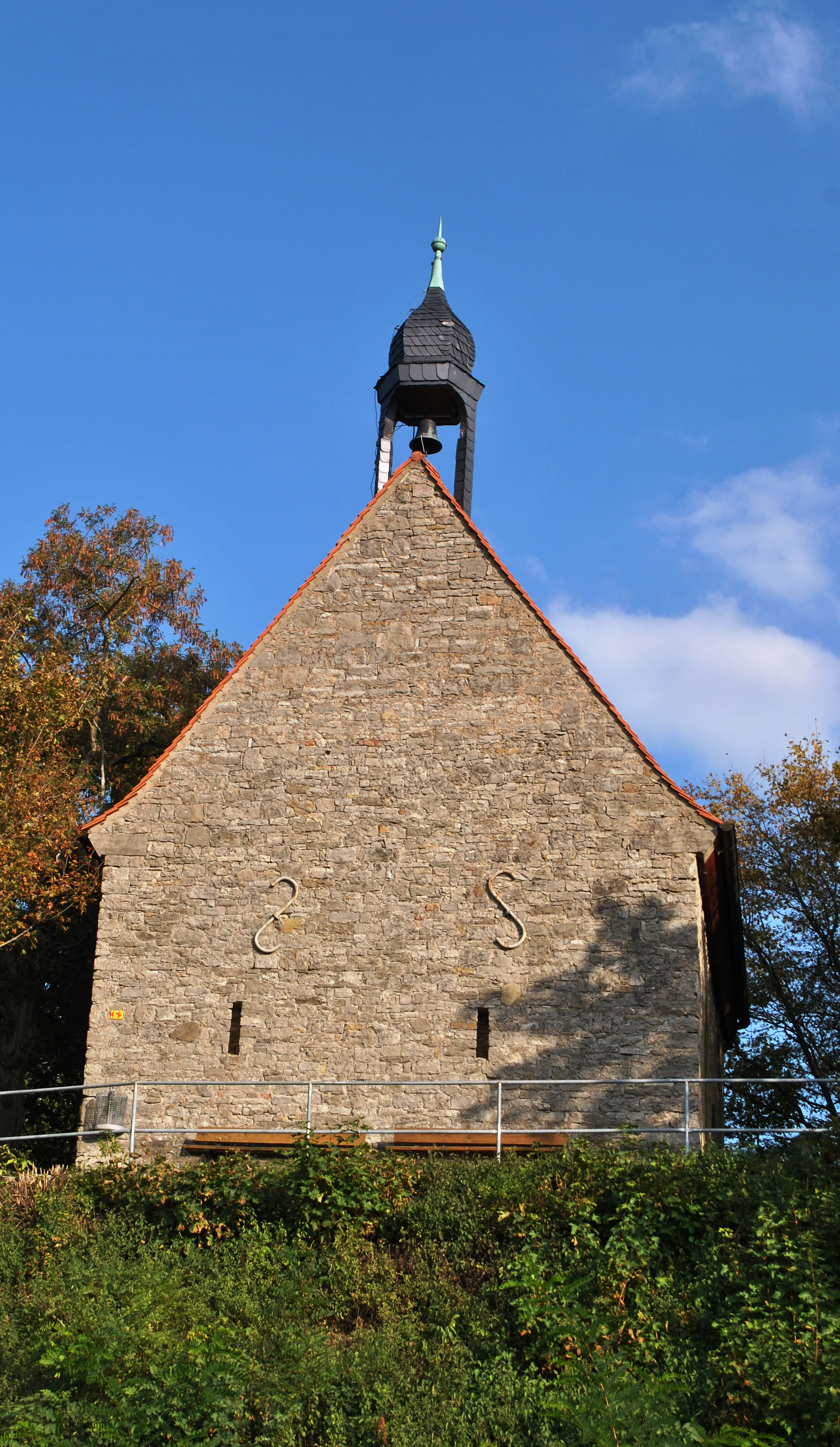 Kapelle St. Moritz gotischer Saalbau mit Fünfachtelschluss und Dachreiter, 1324 erwähnt, Umfassungsmauern von 1510, renoviert 1844This is a photograph of an architectural monument.